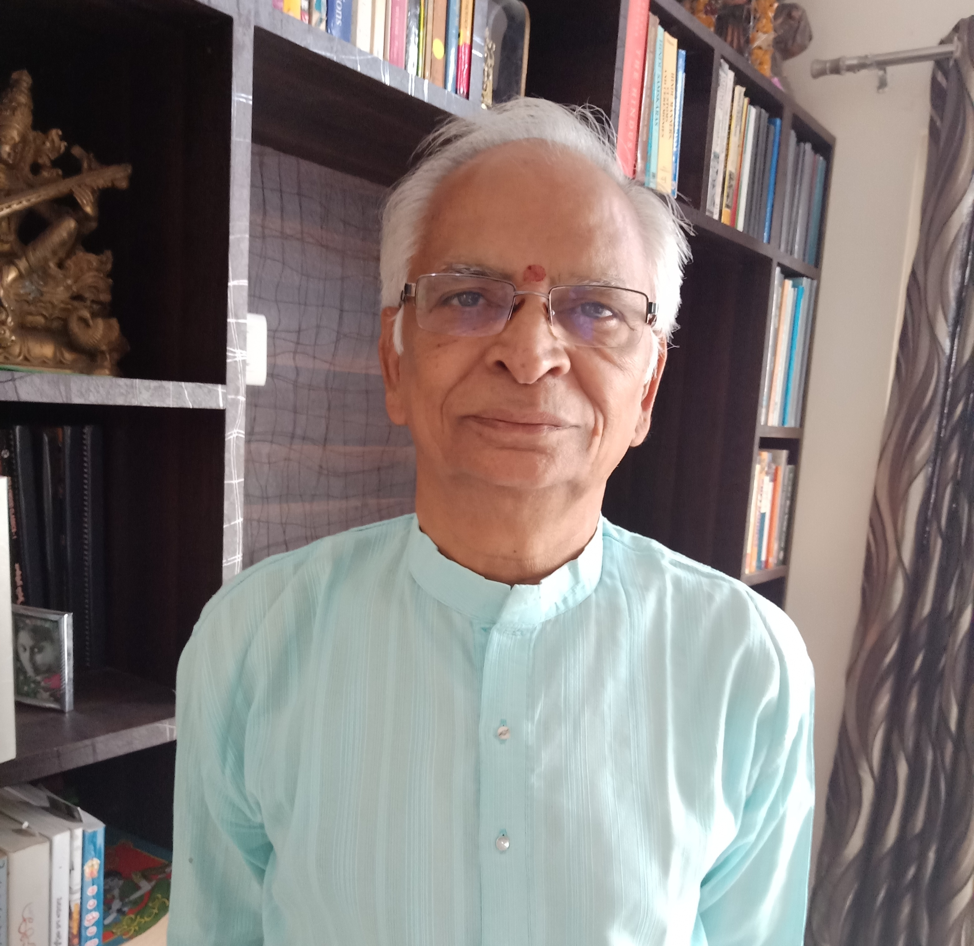 ఇతను 27 గ్రంధాలు,100కి మించిన కథలు రచించాడు, పశ్చిమ గోదావరి జిల్లా, జంగారెడ్డి గూడెం గ్రామంలో 1948 డిసెంబరు 28న జన్మించాడు.